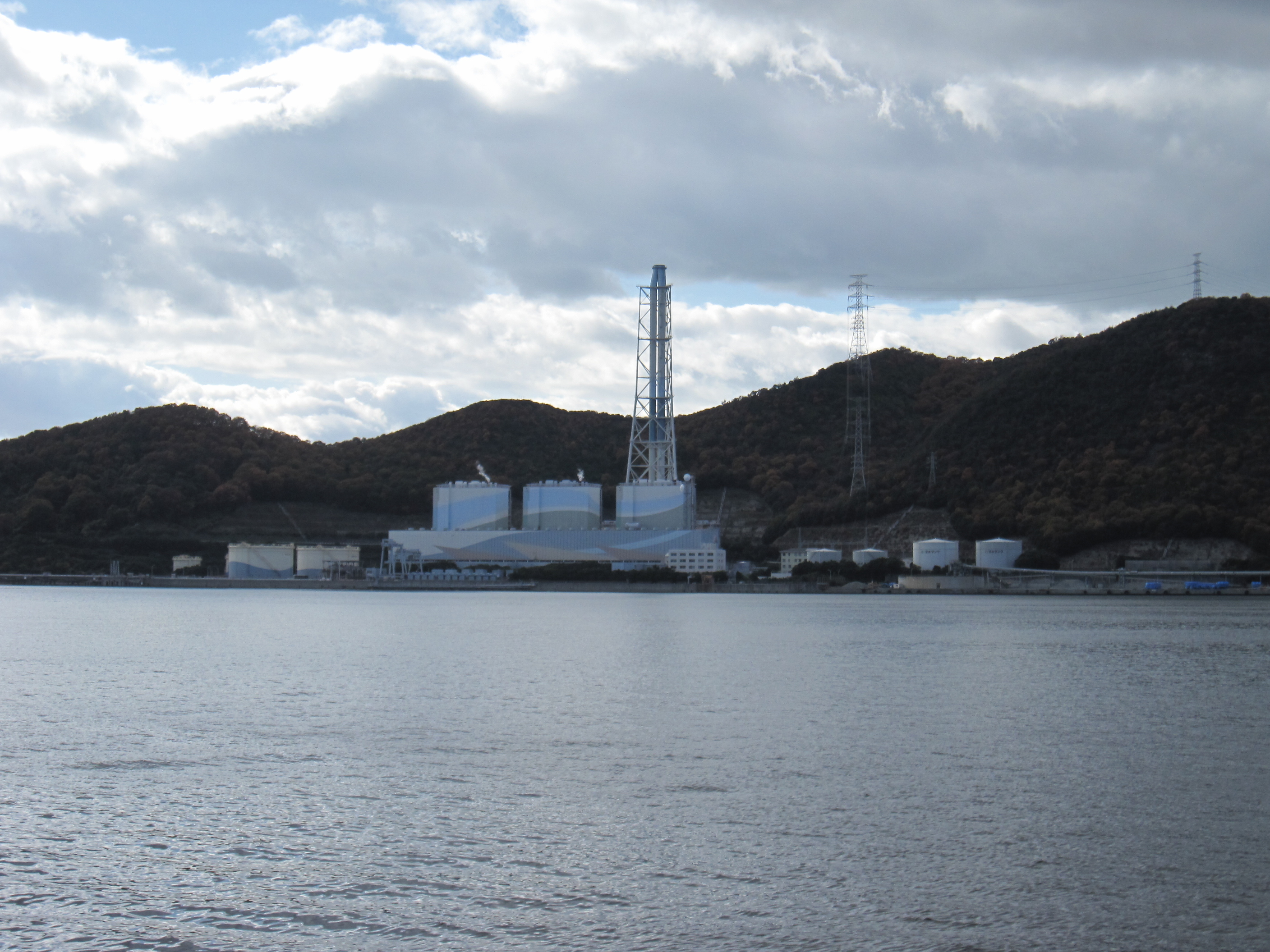 関西電力相生発電所